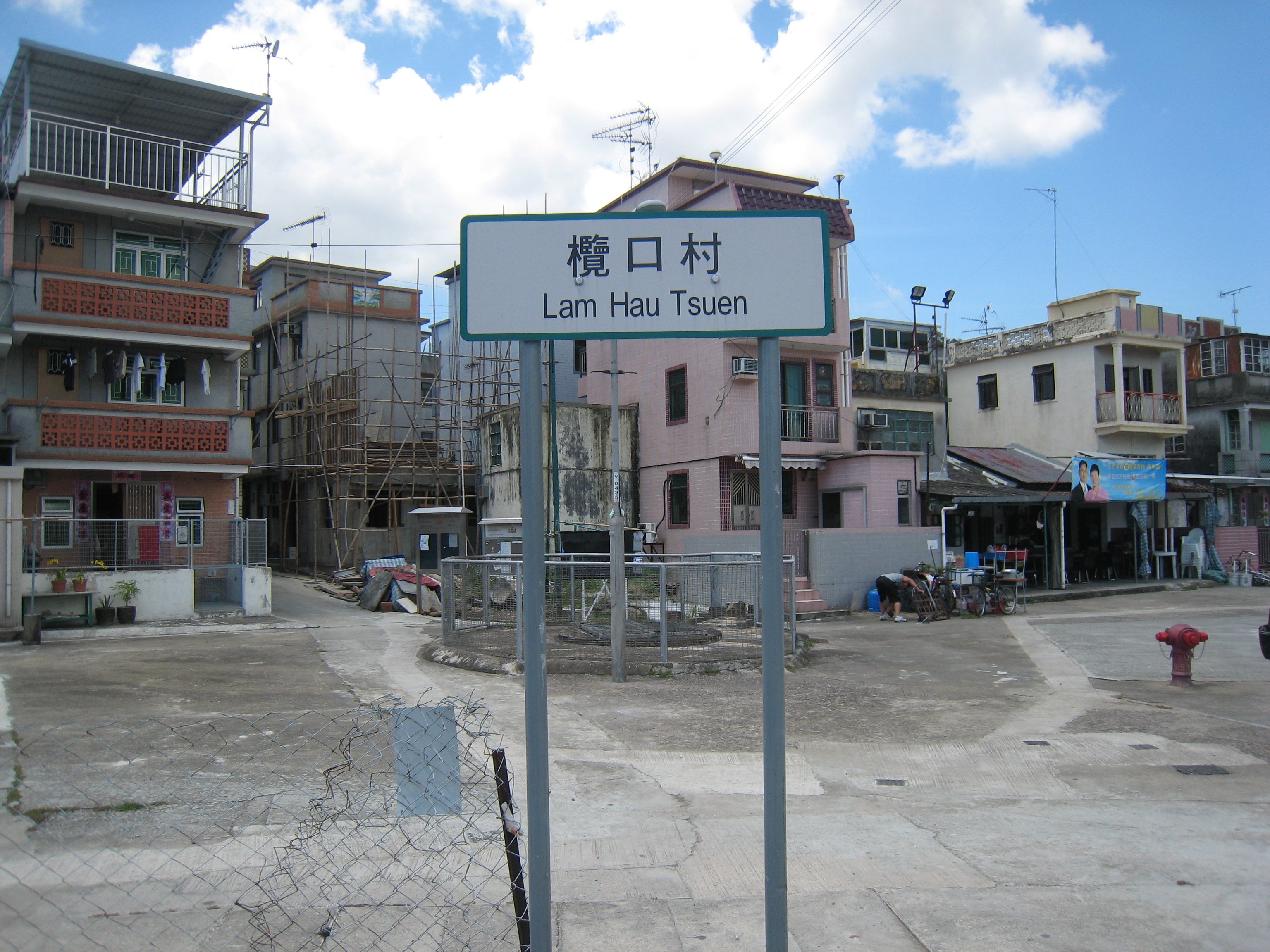 Lam Hau Tsuen